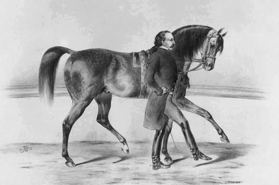 Ernst Jacob Renz (1815−1892) führt einen Araberhengst.